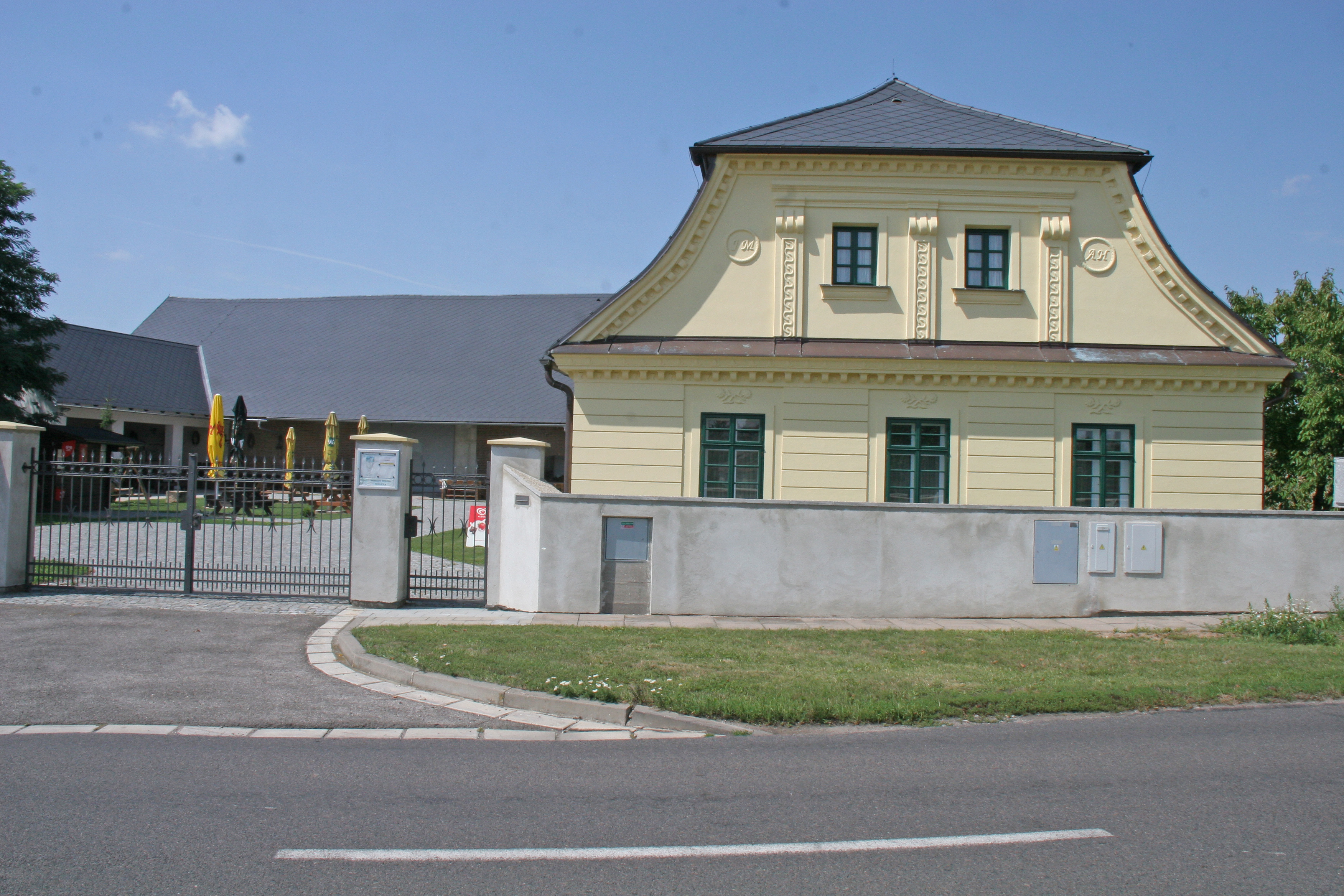 Venkovský dům (Skalička), Skalička 24, Skalička (Skalice).